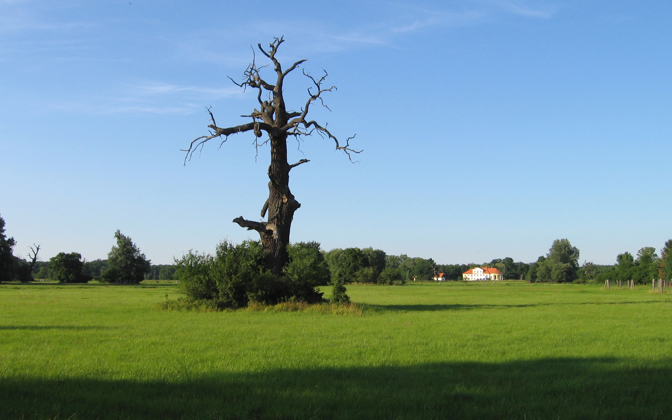 Suchý dub v oboře Soutok. V pozadí lovecký zámeček Lány.